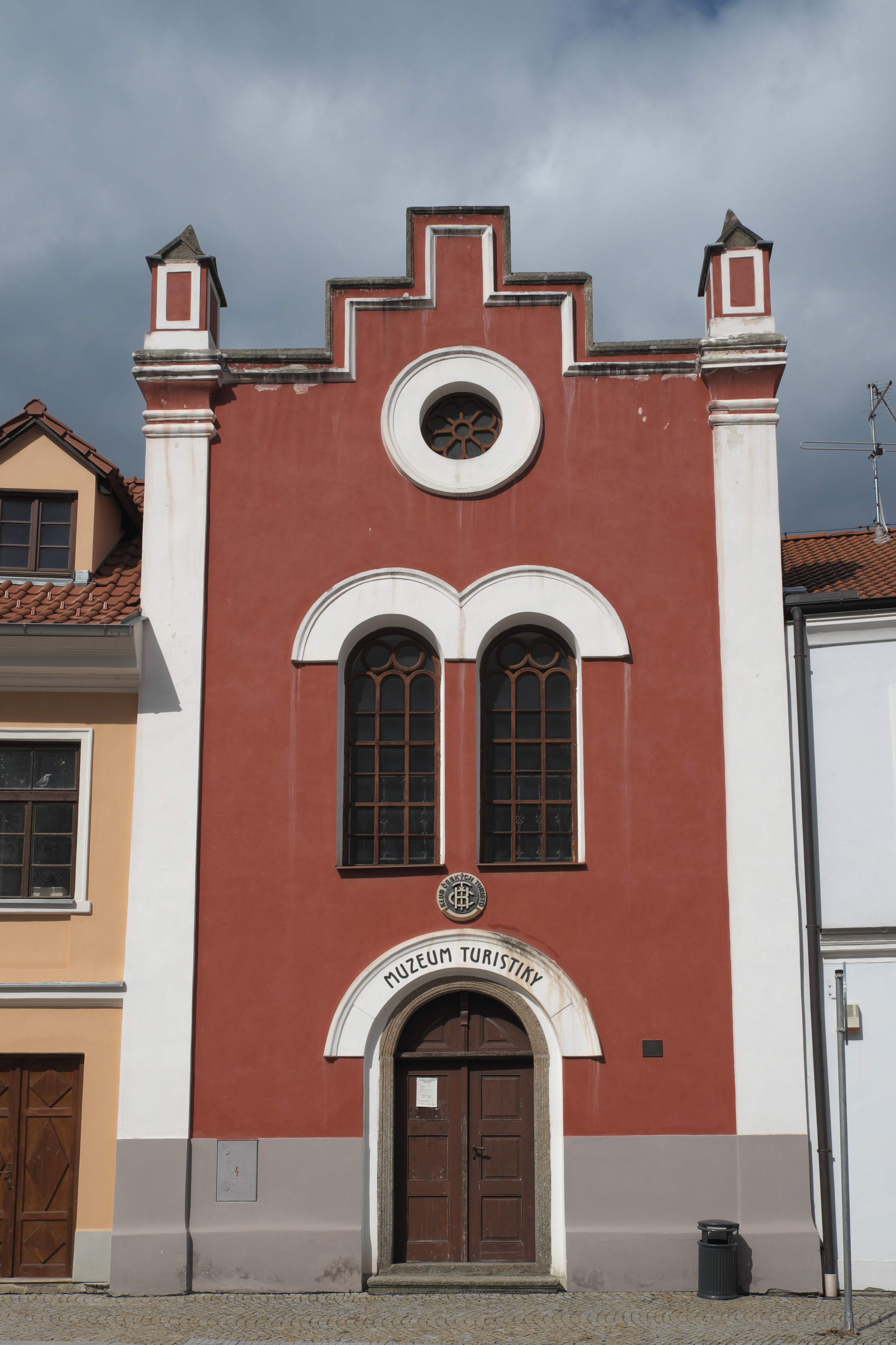 Synagoge in Bechyně (Südböhmen/Tschechien)